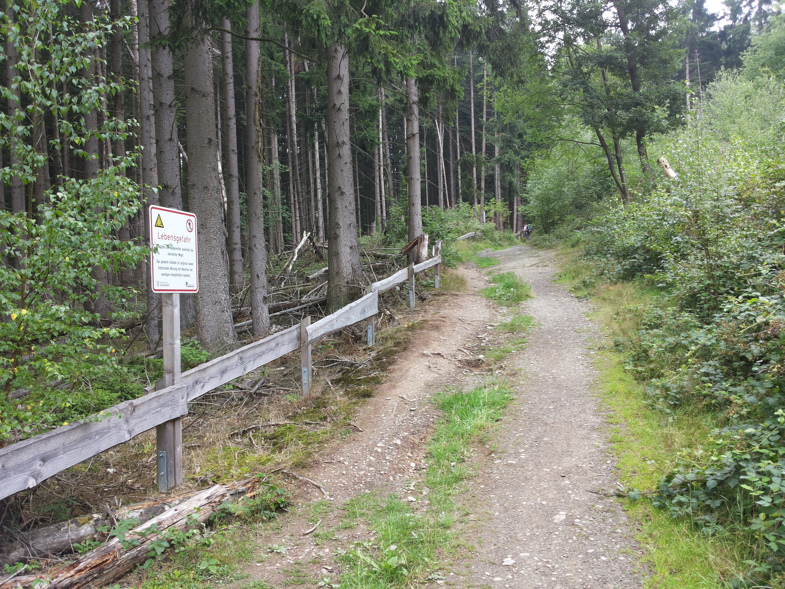 Sperrbereiche Dreibroner Hochfläche (ehemaliger Truppenübungsplatz)